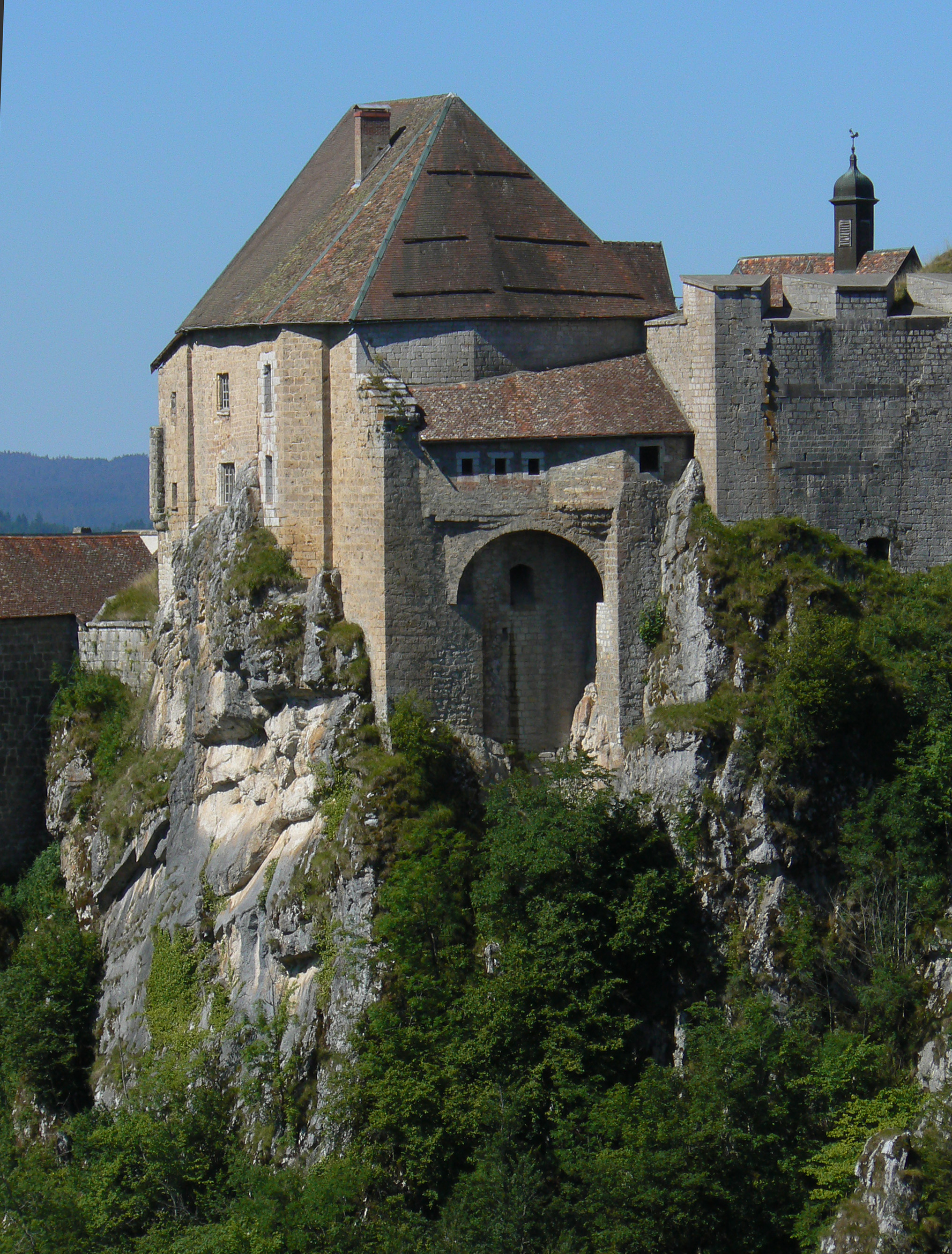 La partie médiévale du château, enchâssée aux rochers de la cluse depuis en l'autre côté, vers 10h.